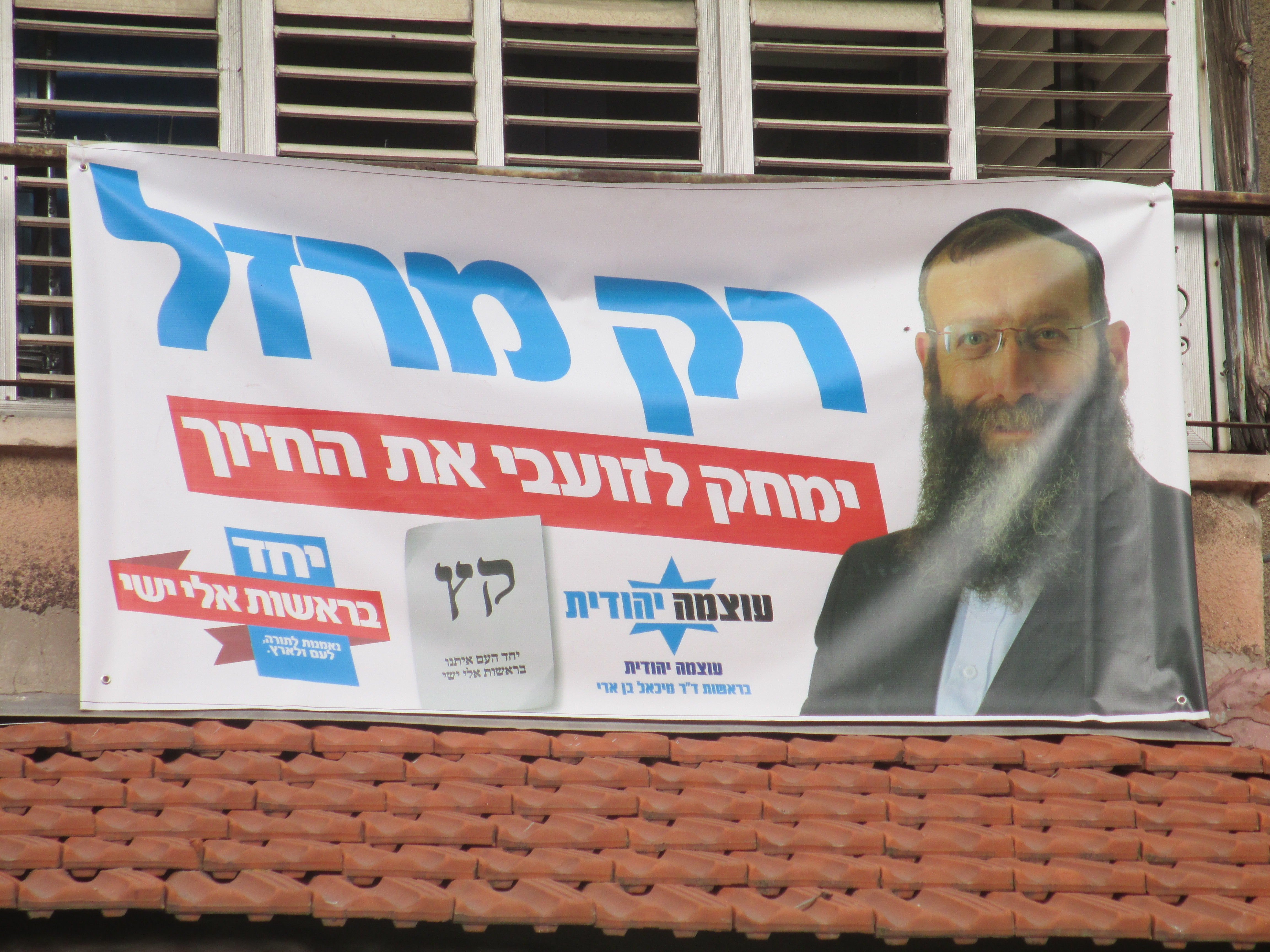 כרזת בחירות 2015, ברוך מרזל (יחד)